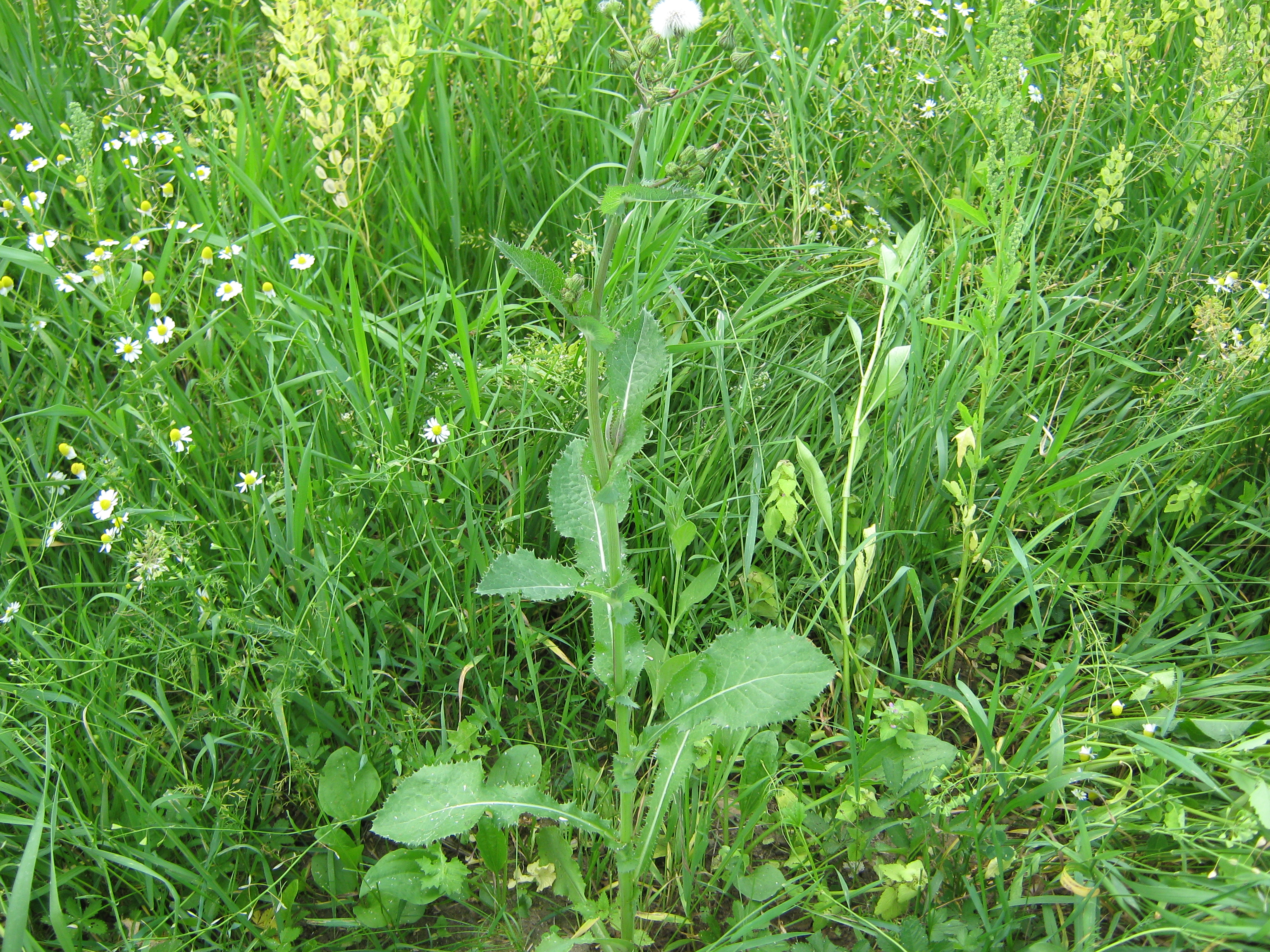 Raue Gänsedistel, Habitus und Standort |1=Laiteron rude ou Laiteron piquant.